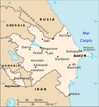 Cia map of Azerbaijan